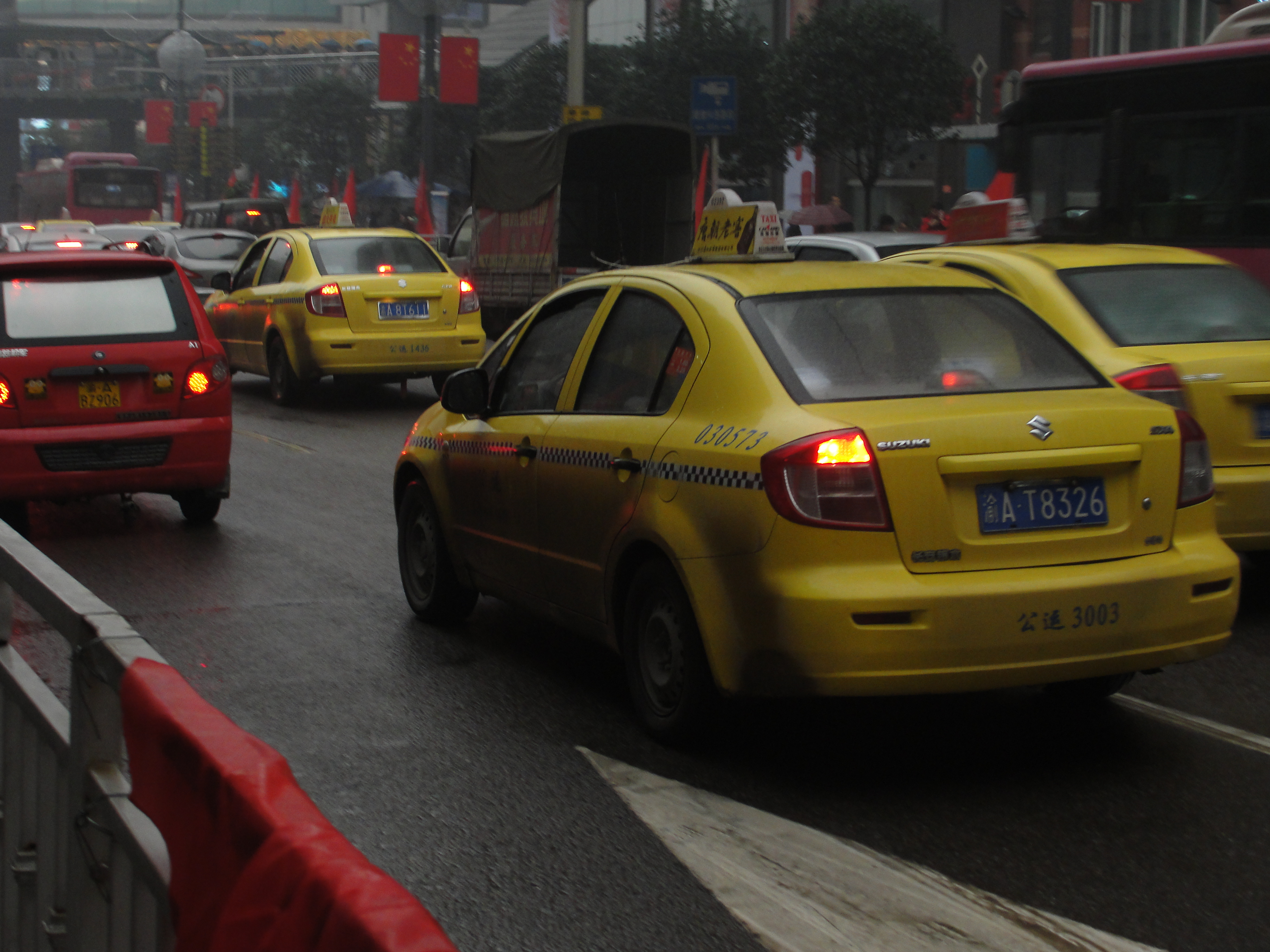 重庆本地自产的长安铃木出租车